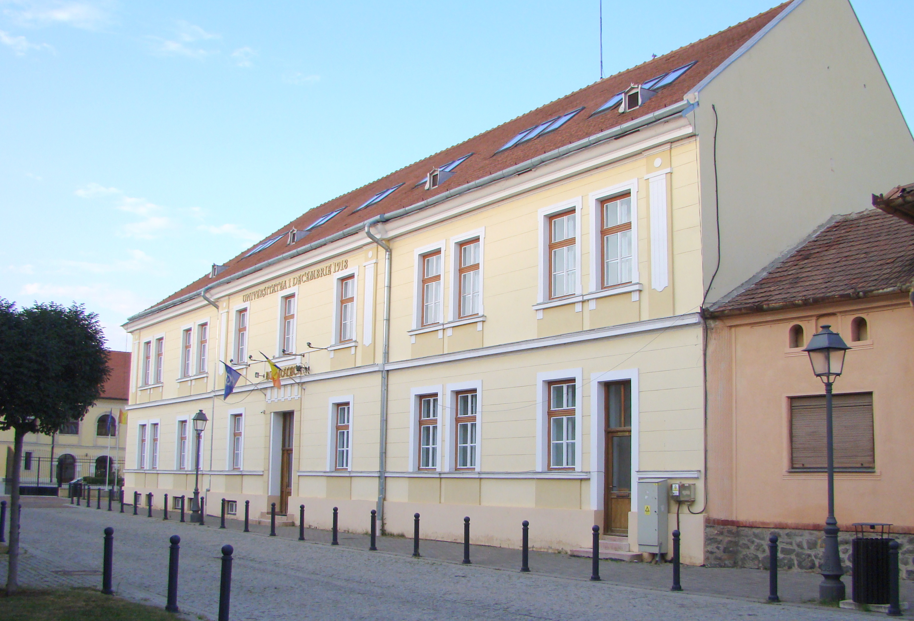 Biblioteca Universității „1 Decembrie 1918”, Str. Șaguna Andrei, mitropolit 6